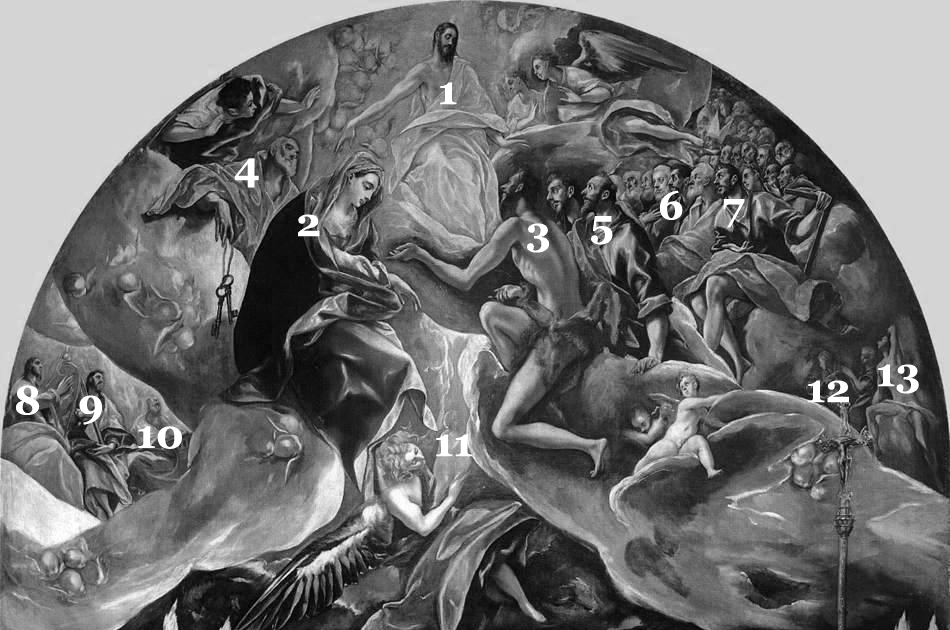 == Description Detalle del cuadro El Entierro del conde de Orgaz del Greco de la Iglesia de Santo Tomeé de Toledo Datebetween 1577 and 1579SourceEl Greco - The Burial of the Count of Orgaz.JPGAuthor El Greco (1541–1614) Alternative namesbirth name: Domenikos Theotokópoulos